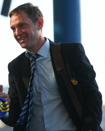 Євген Арановський - український футбольний арбітр